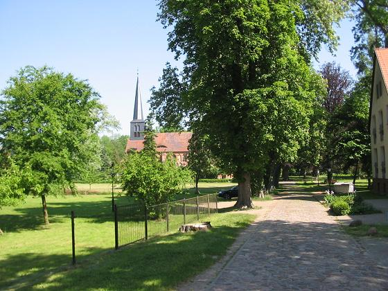 Park am Kloster Marienfließ, Stepenitz in der Prignitz, Brandenburg fotografiert im Mai 2005 von Lienhard Schulz